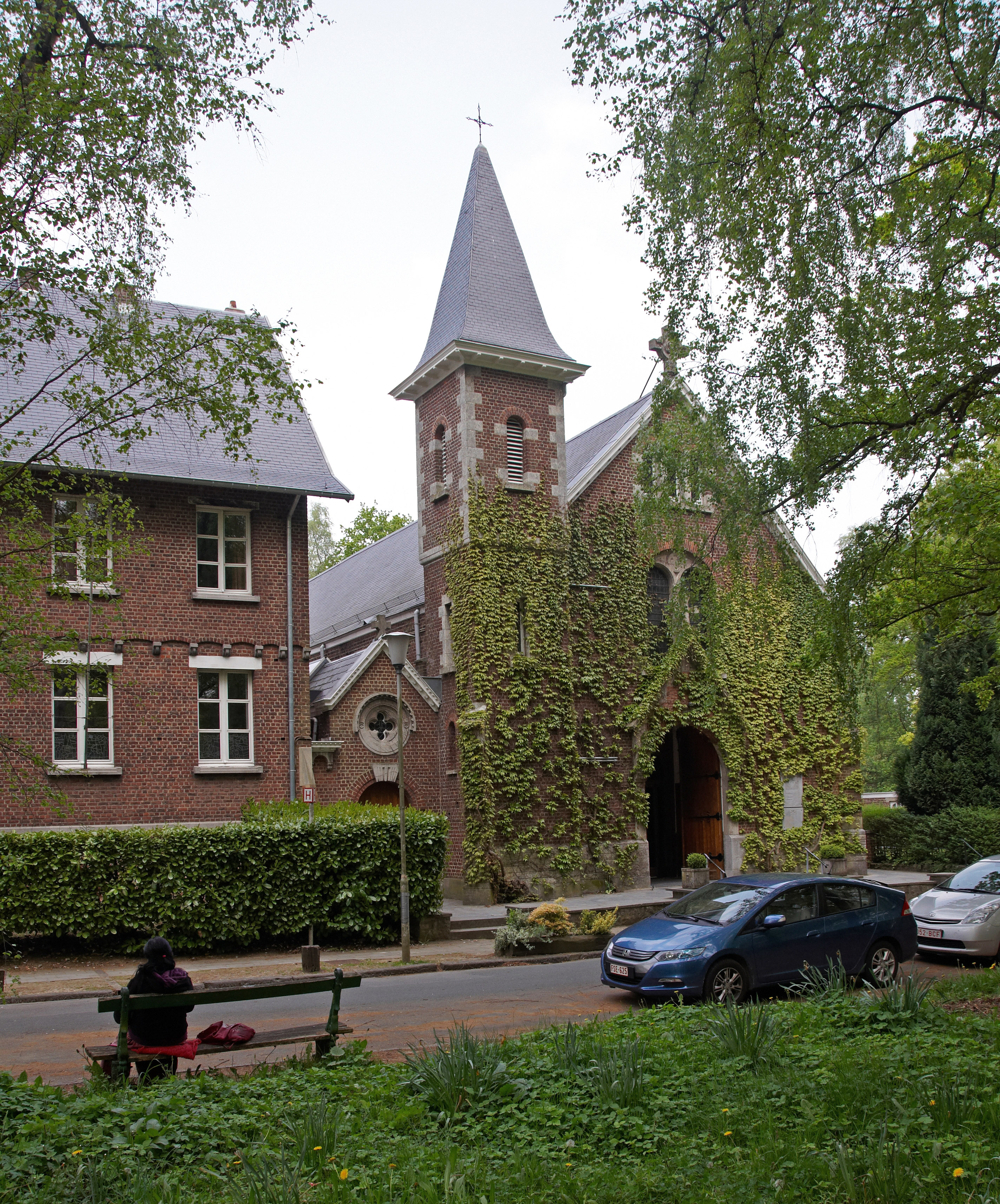 Sint-Annakerk in Ukkel, België